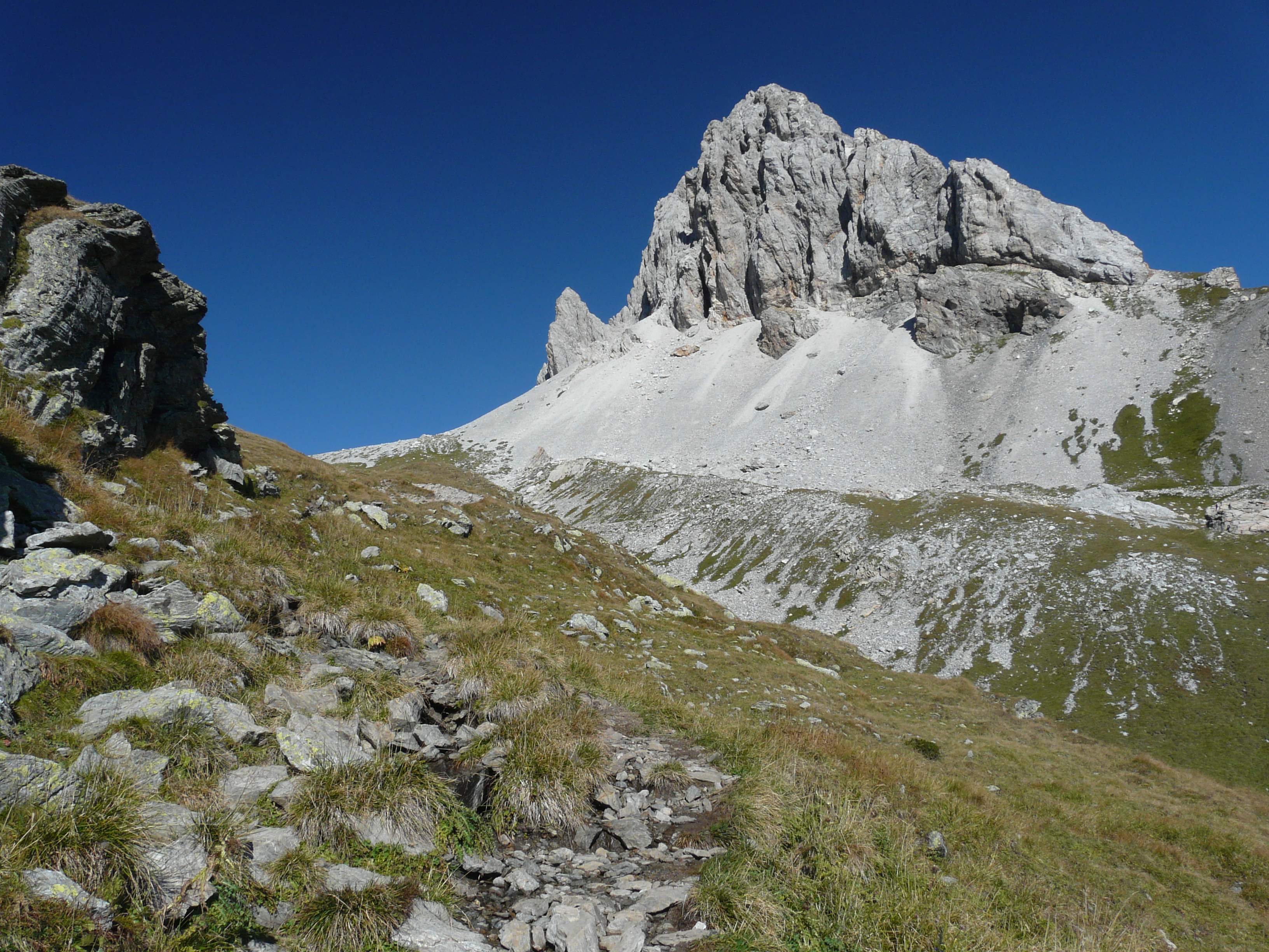 Das Bergmassiv der Großen Kinigat in den Karnischen Alpen.